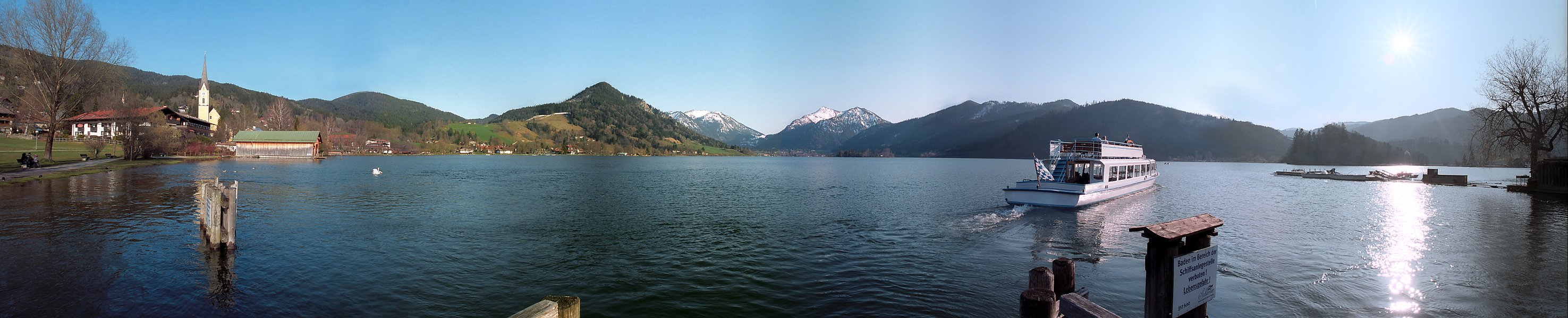 Blick im Frühling über den Schliersee von der gleichnamigen Ortschaft aus. Panorama zusammengesetzt aus 6 Einzelaufnahmen. Bildwinkel ca. 180 Grad, rechts ist Westen, in der Mitte Süden, links Osten. Abendstimmung